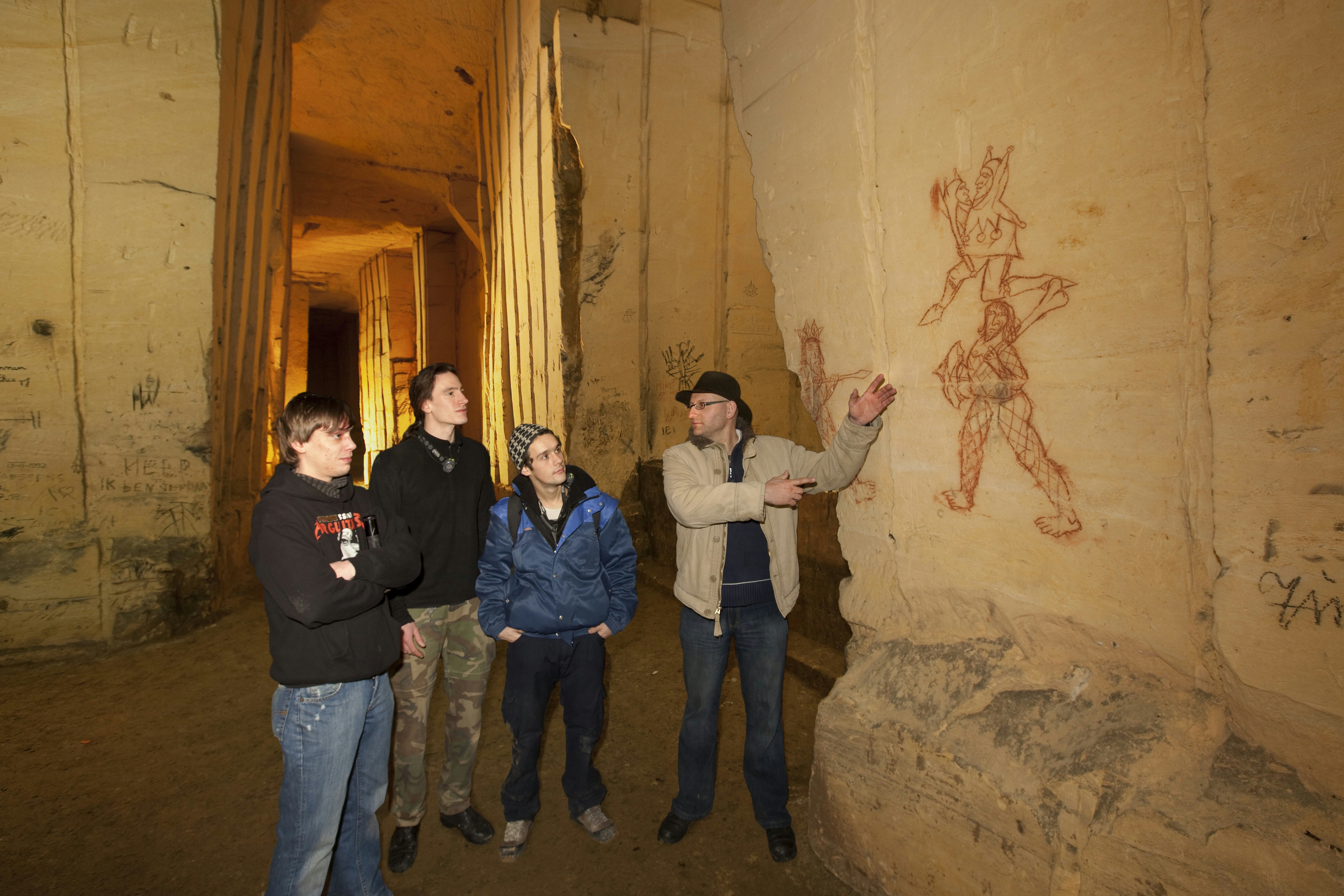 Mergelgrot/ Persoon: Interieur, overzicht mergelgrot